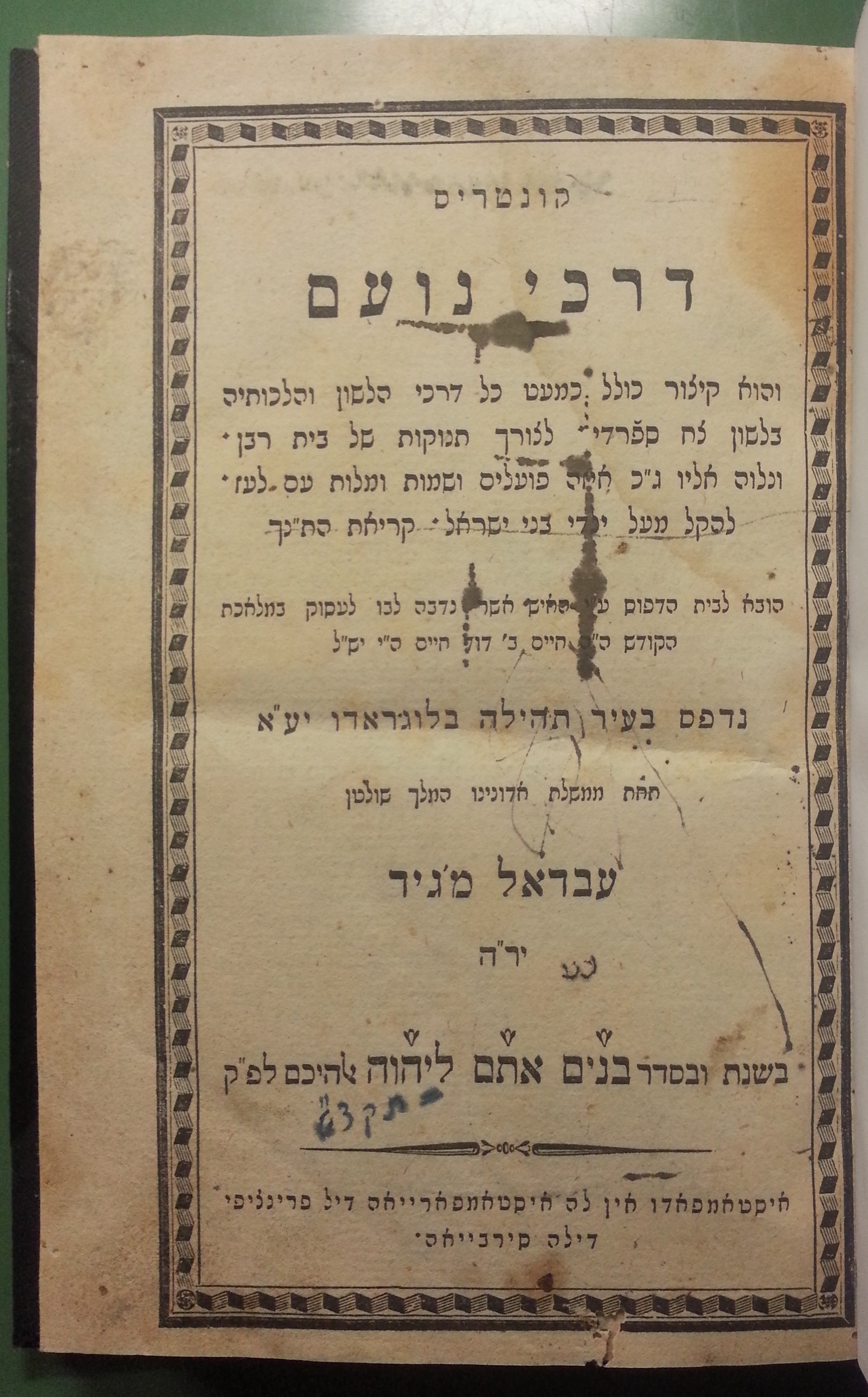 שער ספרו של הרב יהודה אלקלעי, דרכי נועם